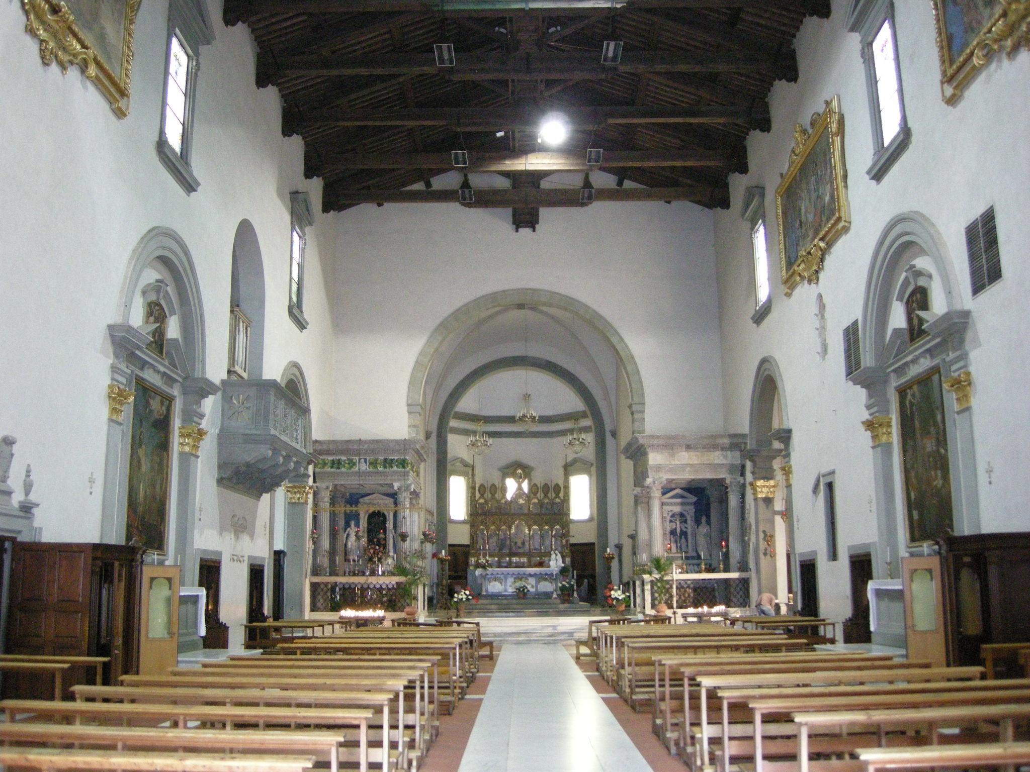 Santuario di Santa Maria dell'Impruneta, interno